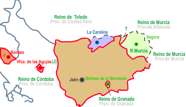 TERRITORIOS Belmez - Pérdida Segura - Incorporación Nuevas Poblaciones de Andalucía y Sierra Morena J: Jaén T: Toledo Reino de Toledo Reino anterior a 1833 Prov. de Ciudad Real Provincia nueva de 1833